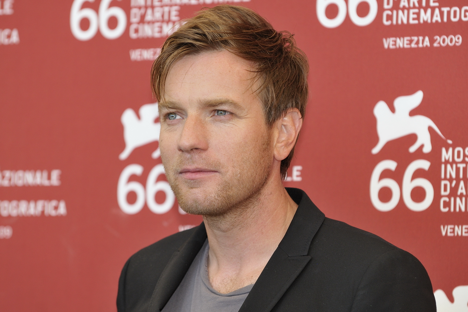 66ème Festival du Cinéma de Venise (Mostra), 6ème jour (07/09/2009) Photocall avec George Clooney et Elisabetta Canalis, Ewan McGregor et le réalisateur Grant Heslov pour le film : The men who stare at goats